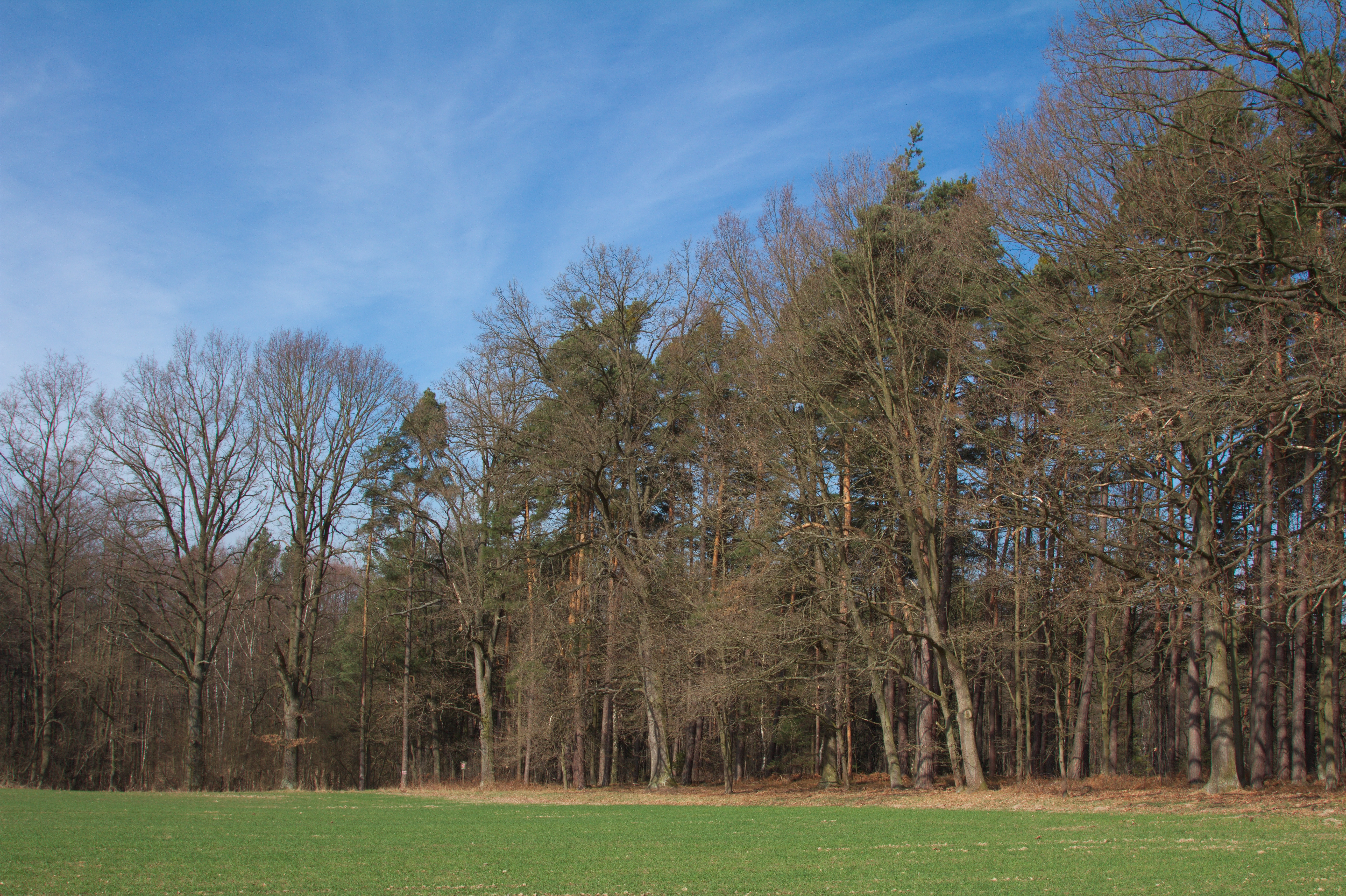 PR V Rájích